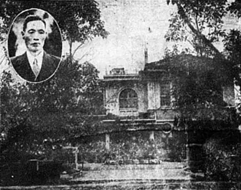 竹南街役場和初代街長林萬言吉